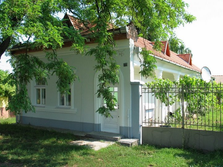 Felújított régi porta Tófalun